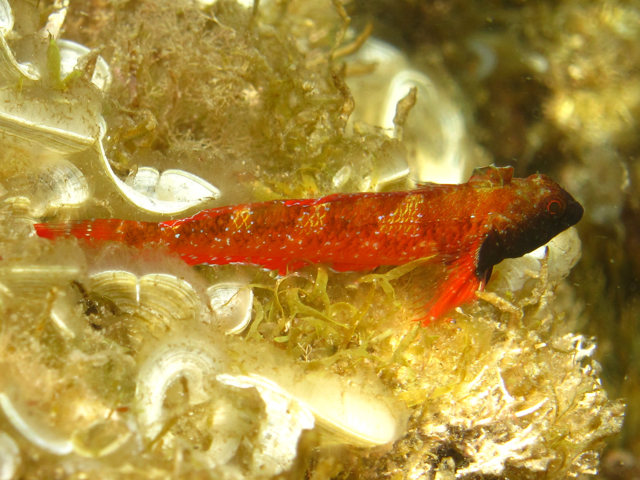 Bavosa morruda a la Costa Brava